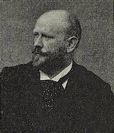 German painter Hans Looschen in 1897